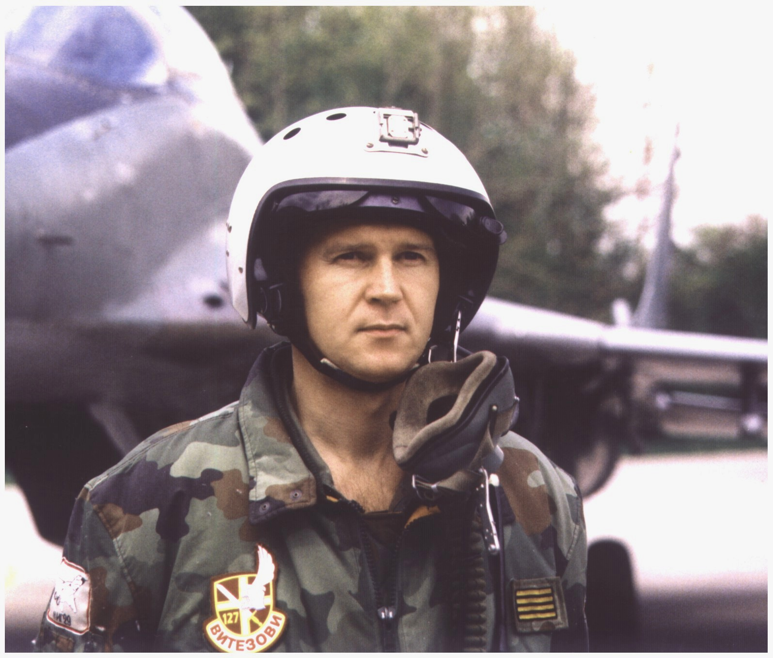 Зоран Радосавлевич у МИГ-29 1997 год.